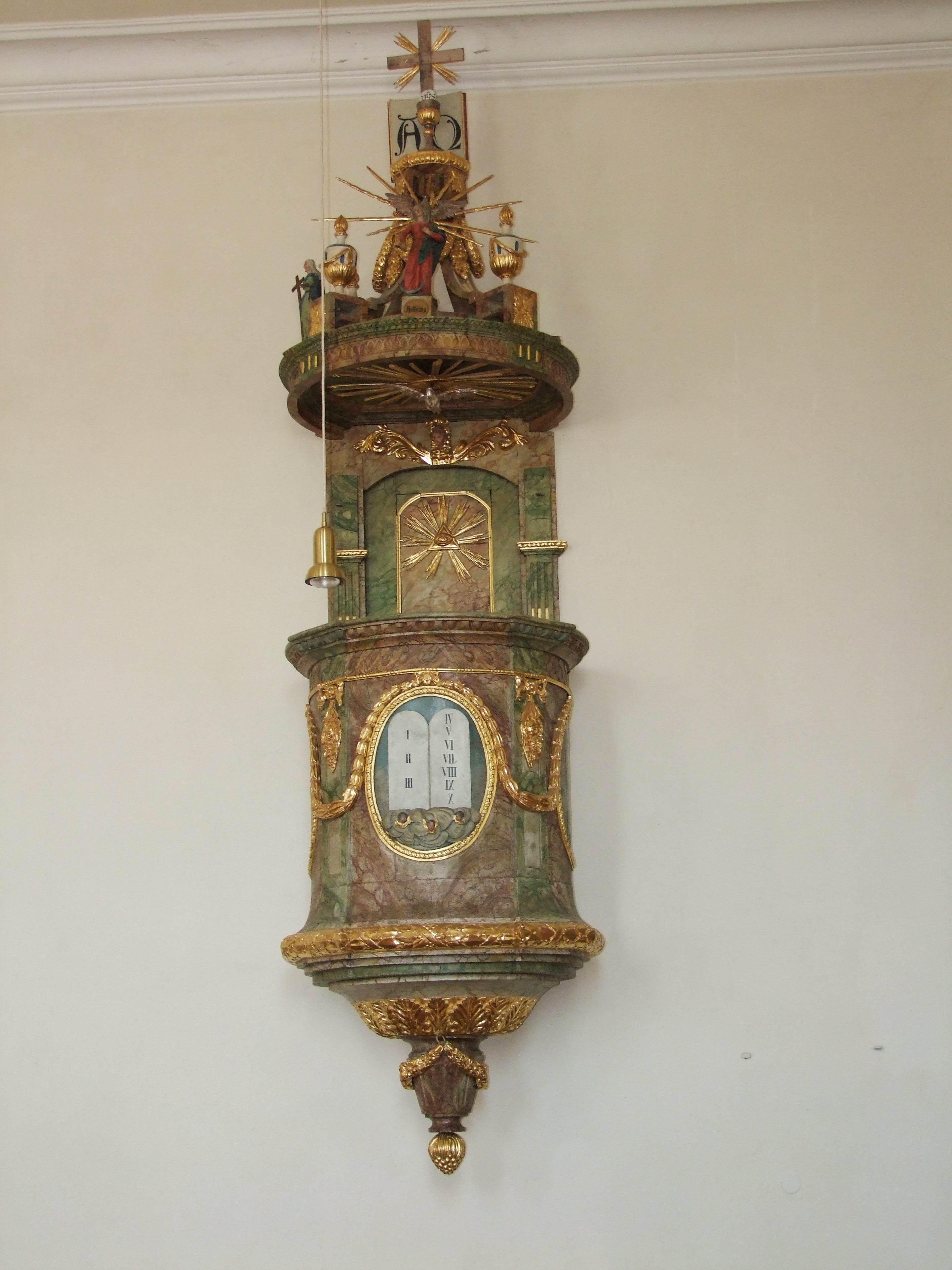 Kanzel in St. Agatha (Illerrieden). Geschaffen von Pfarrer Michael Mathias Braig 1818 - 1832